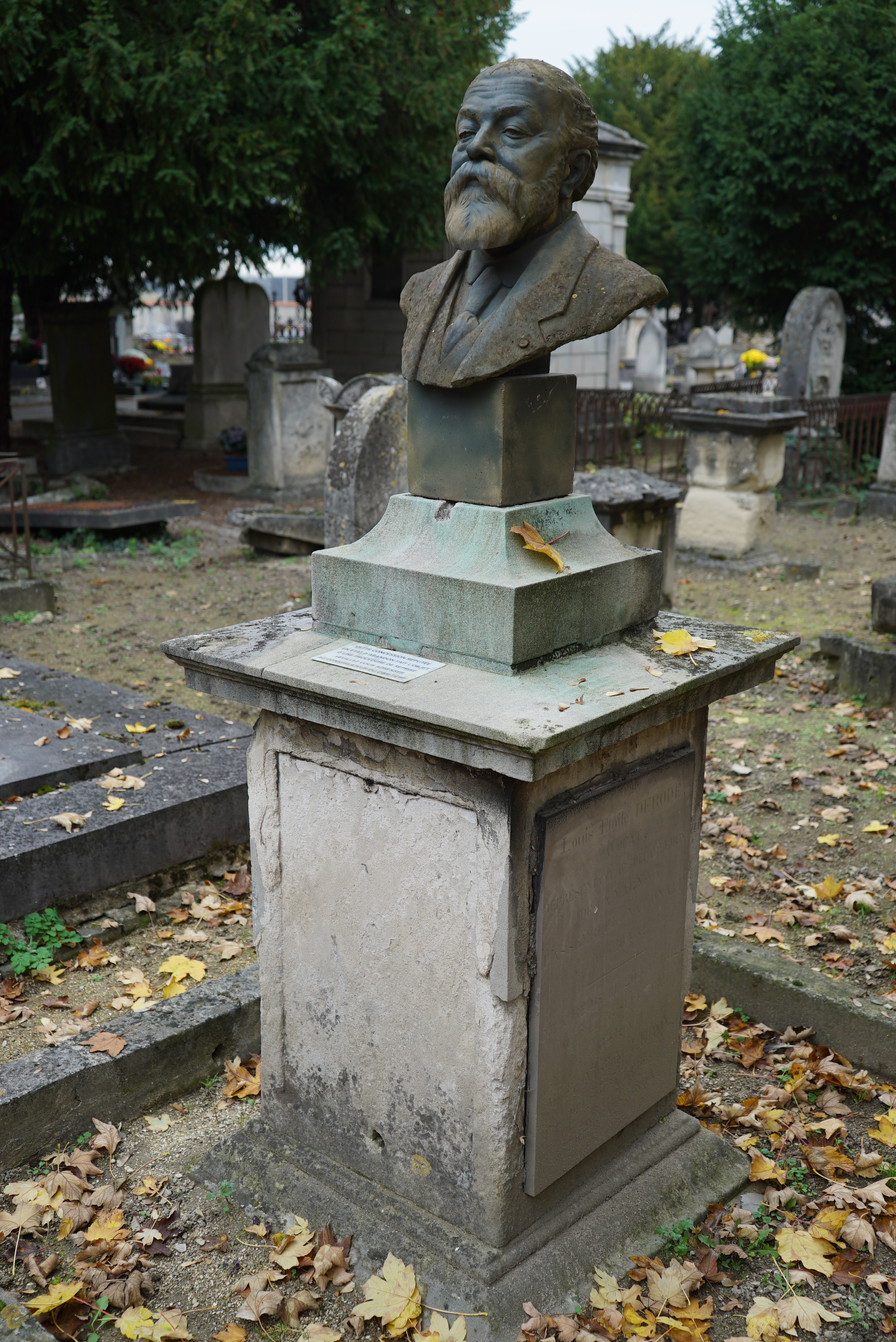 buste de Louis Émile Dérodé par Eugène Bourgouin au cimetière du nord